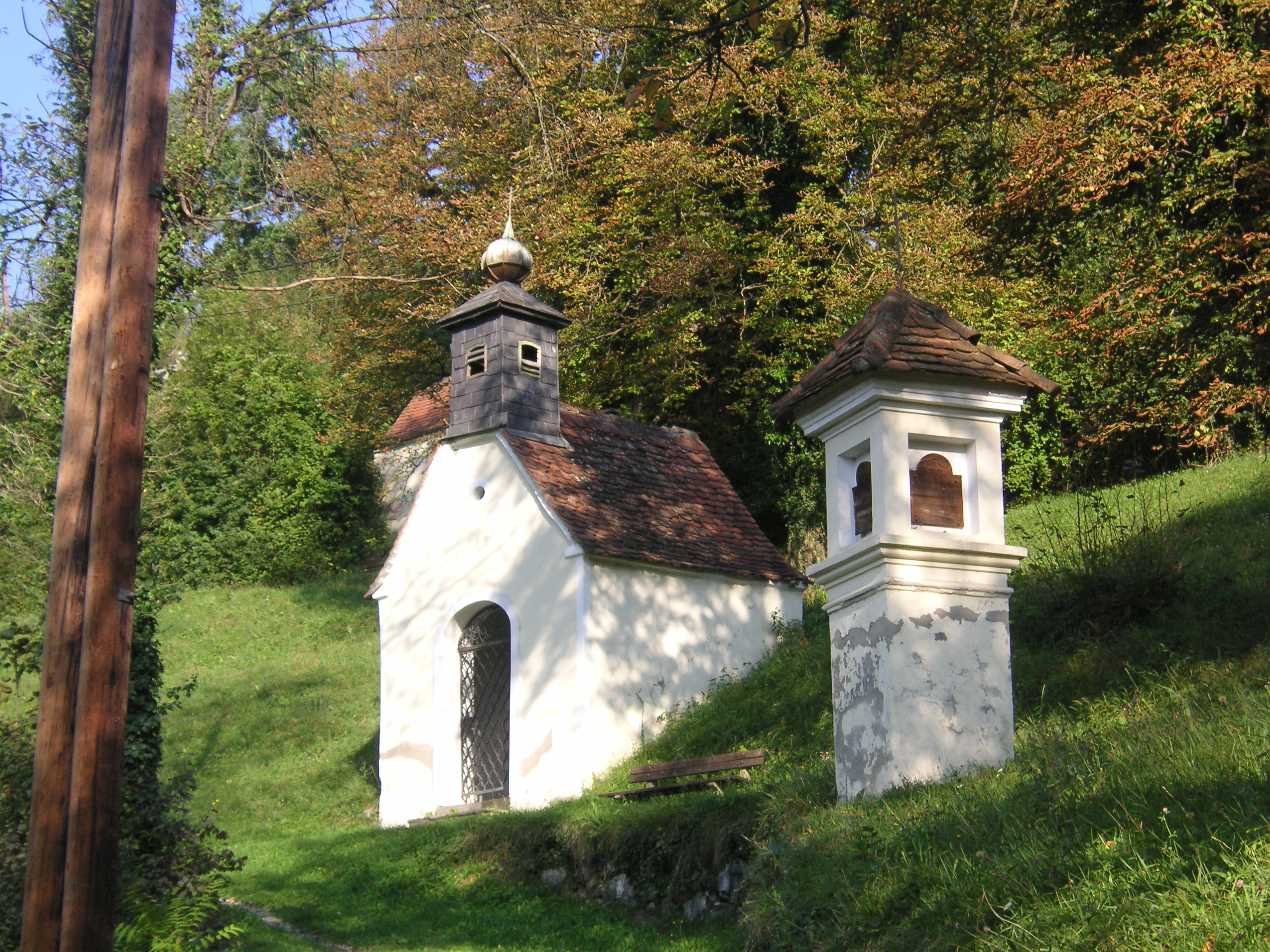 Kalvarienberg in Deutschfeistritz